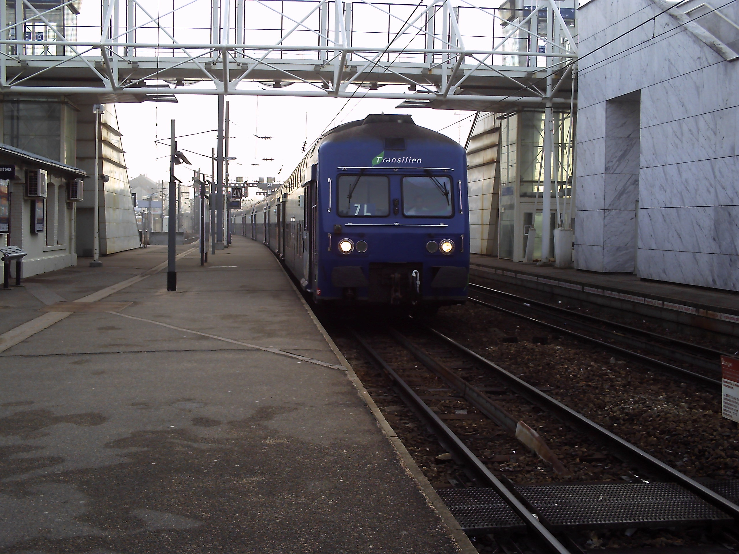 Train en provenace de Paris-Montparnasse arrivant à Mantes-la-Jolie